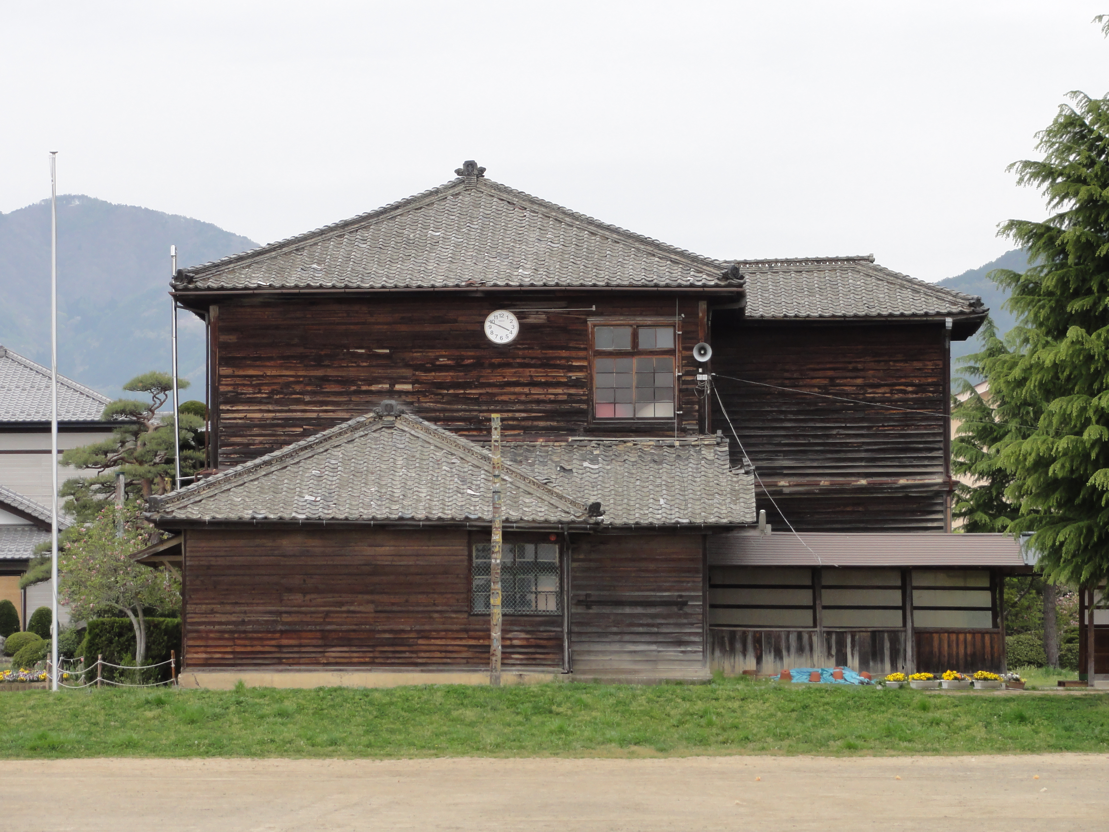 昇降口を写した写真